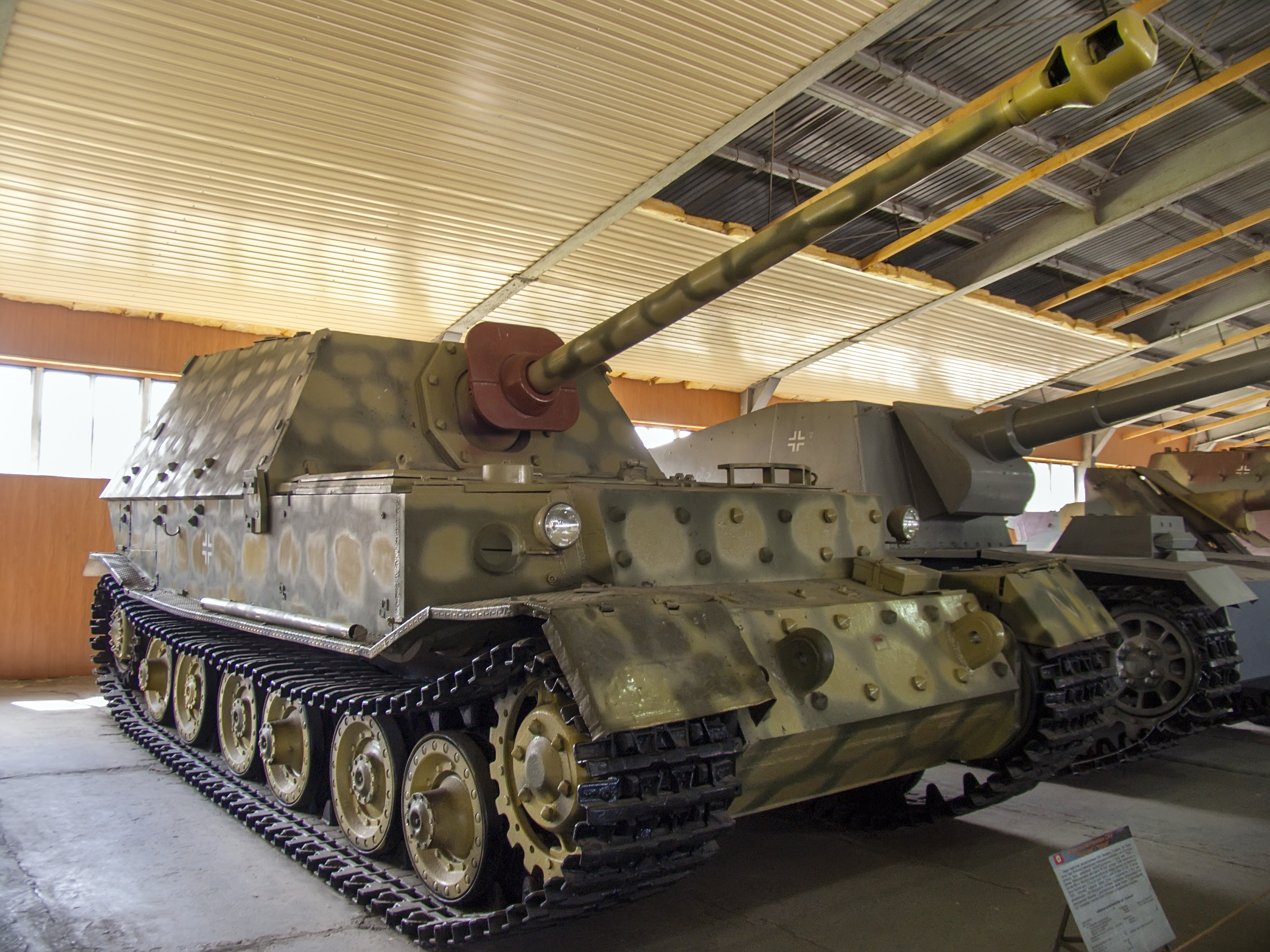 Противотанковая самоходная установка «Фердинанд» (SdKfz 184) в Центральном музее бронетанкового вооружения и техники в Кубинке.